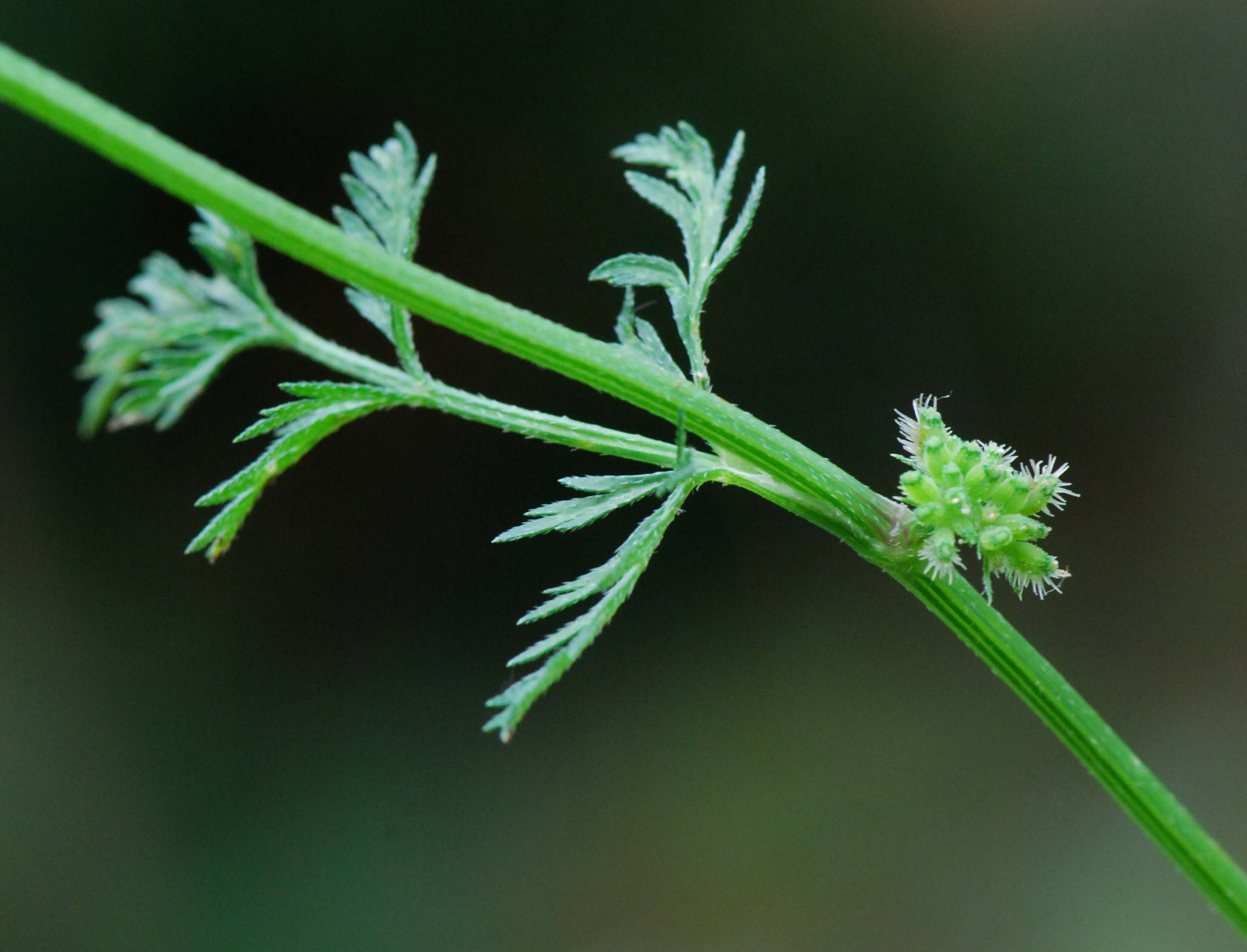 Torilis nodosa, feuille, fruits